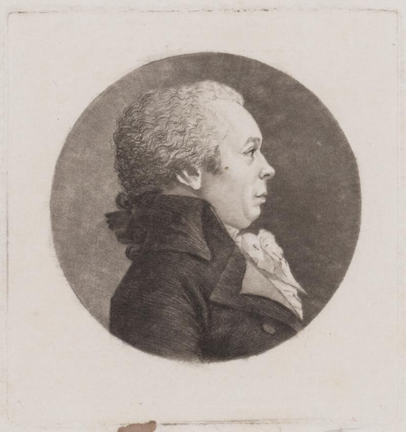 Portret van Theodorus van Kooten (1749-1813) Onderwerpstrefwoorden in een tondo, borststuk, hoofd terzijde naar rechts (profil), lichaam terzijde naar rechts (profil), en profil, mansportret. (tekst RKD)